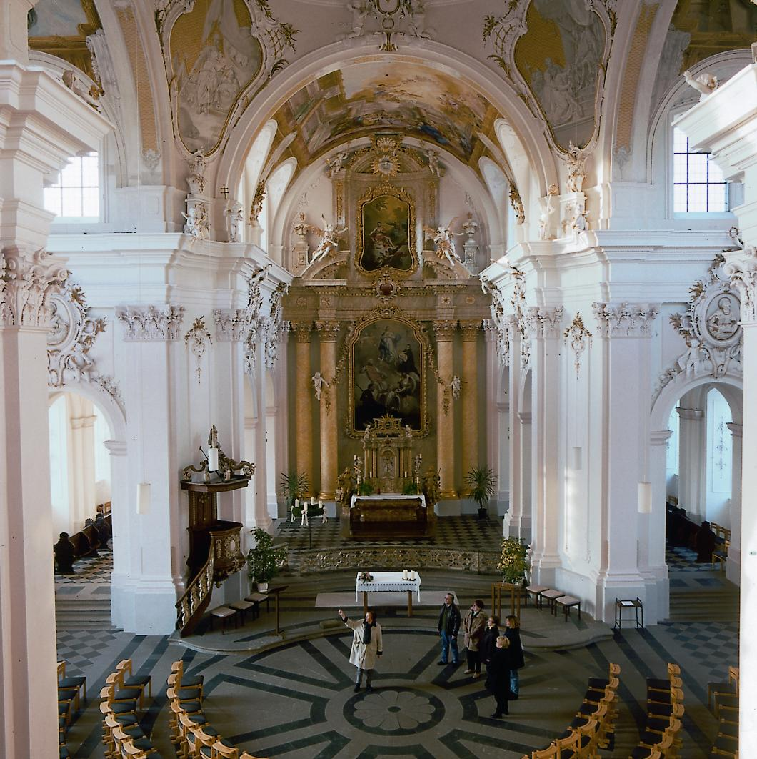 Innenansicht der Immaculata-Kirche in Büren, Blick durch Hauptschiff in den Chor, von der Orgelbühne aufgenommen. Freundlicherweise zur Verfügung gestellt von Hrn. Altemeier, Tourismusbeauftragter der Stadt Büren, Veröffentlichung unter GNU-FDL zugestimmt